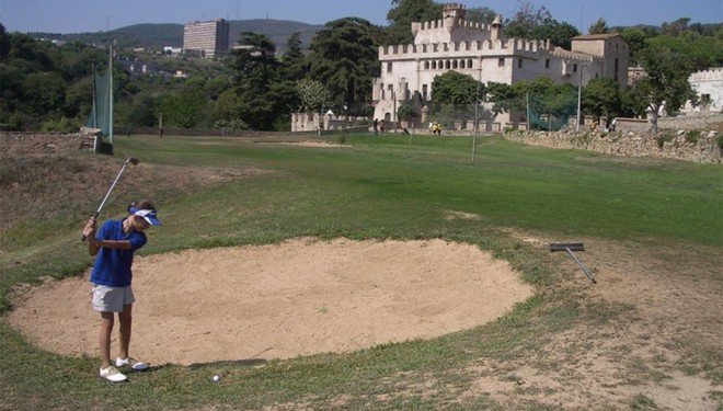 Pista Pitch & Putt del Castell de Godmar, a Badalona